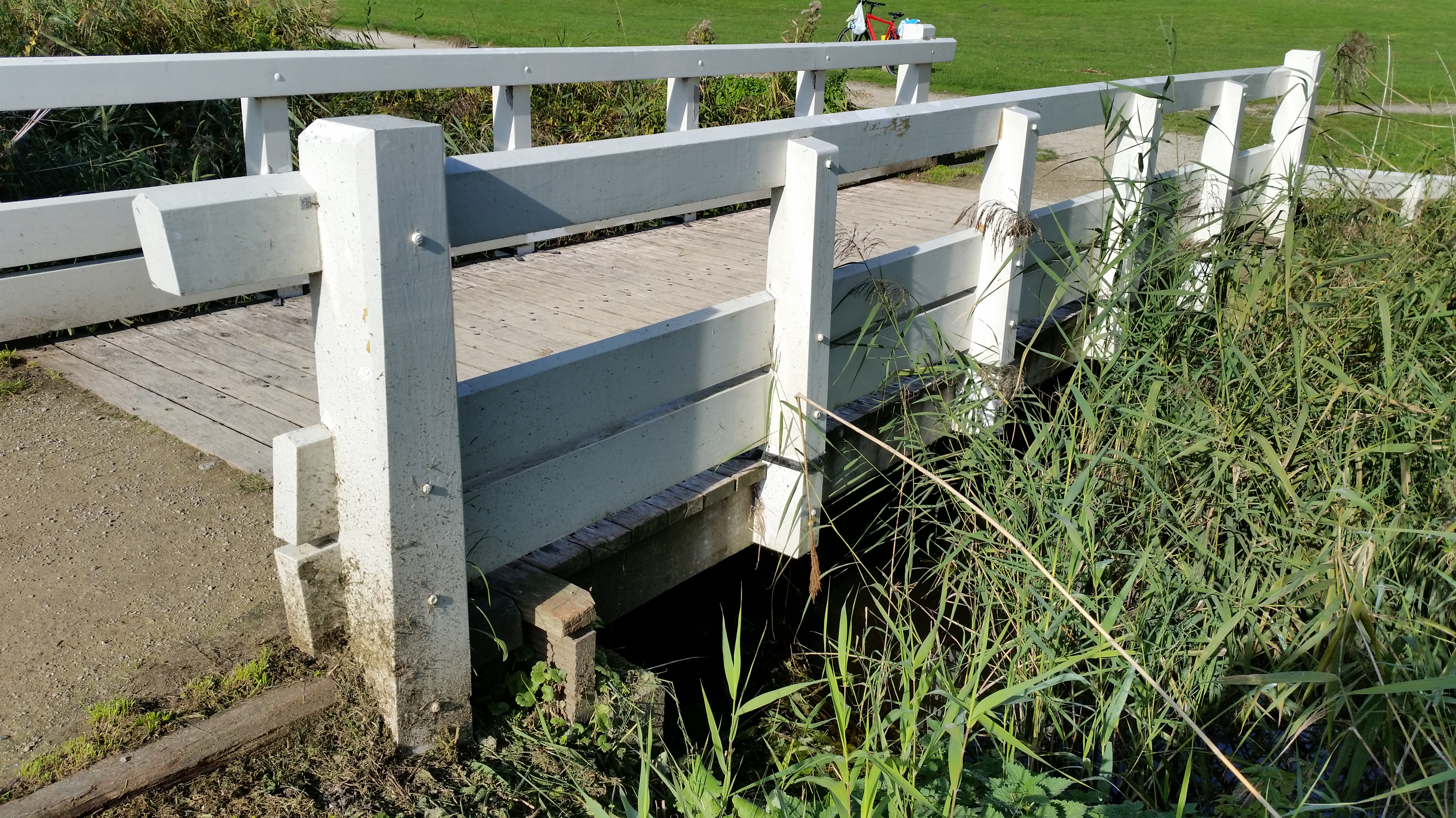 Brug 500 (in Amsterdam), overspanning